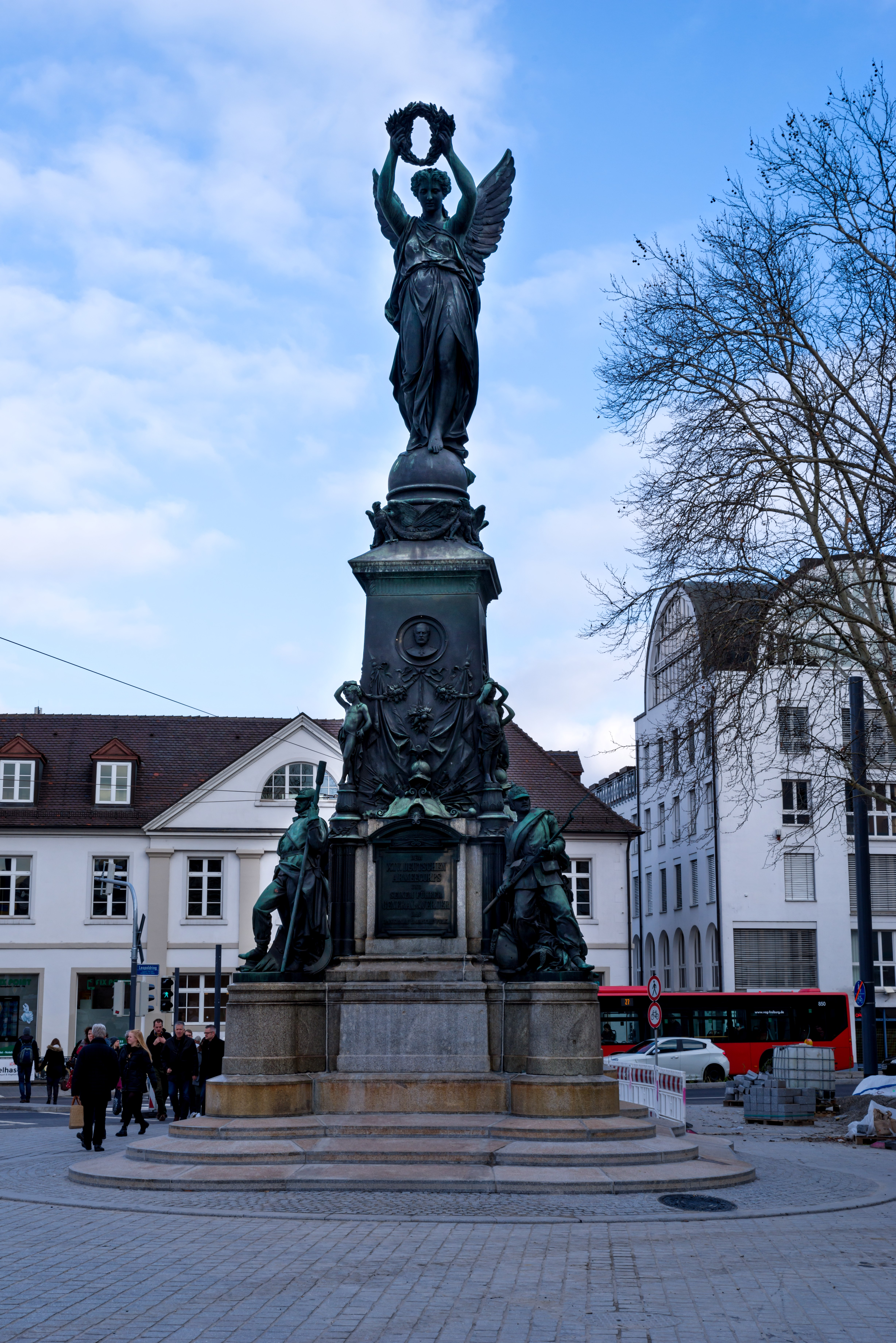 Bilder aus Freiburg